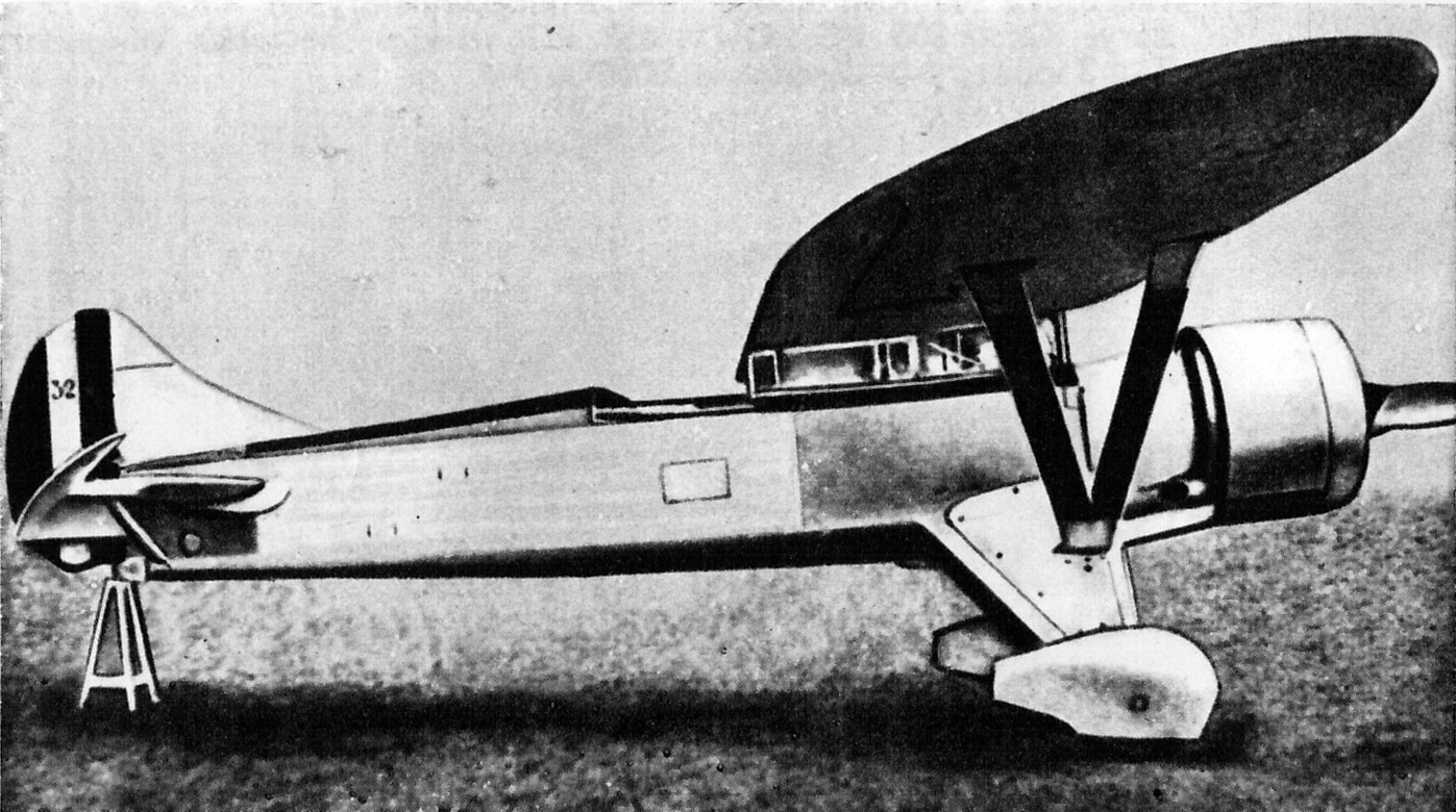 Belgijski samolot myśliwski Renard R.32.